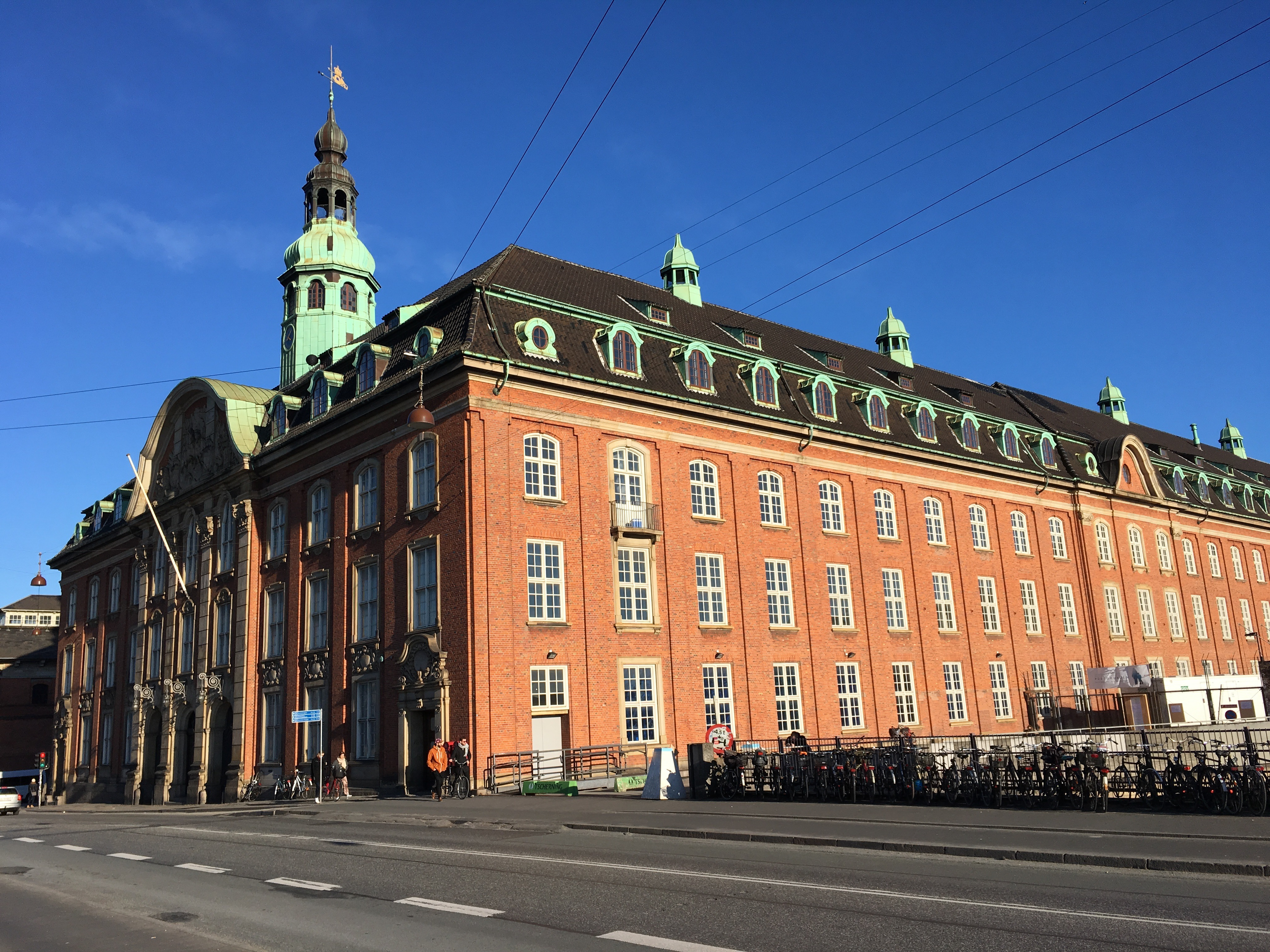 Centralpostbygningen i København